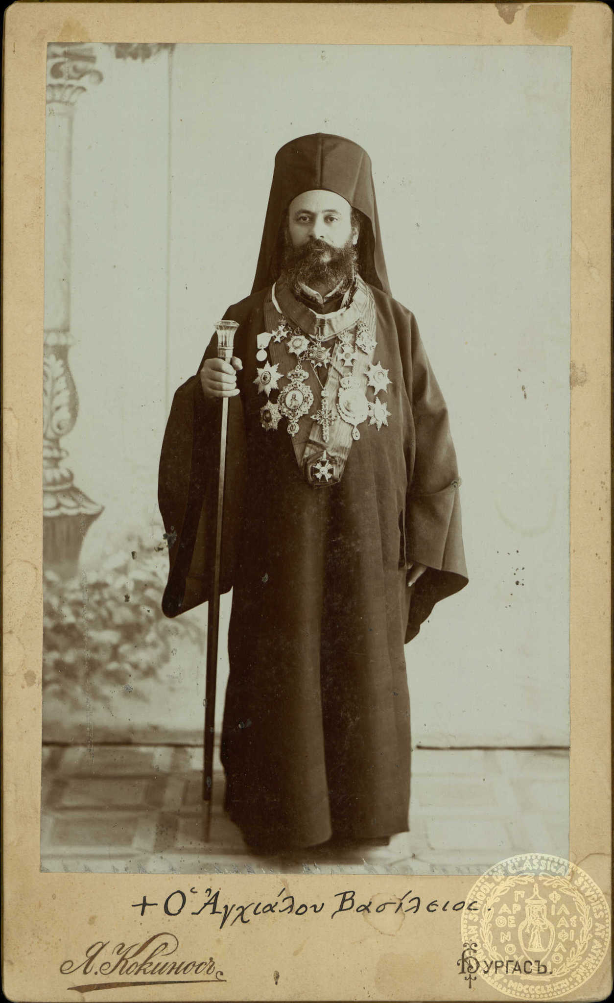 Василиос Анхиалски, по-късно Константинополски